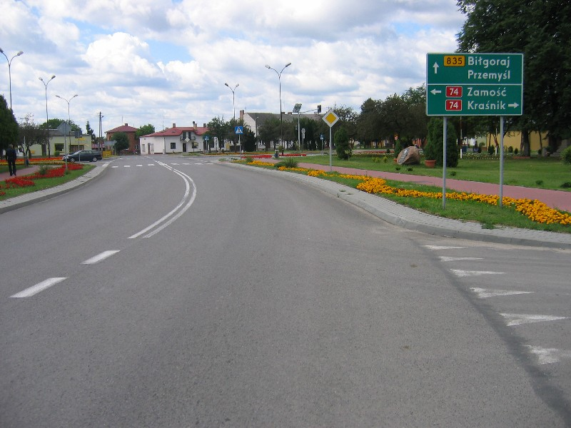 Tutaj Dw835 ma pierwszeństwo nad drogą krajową nr74